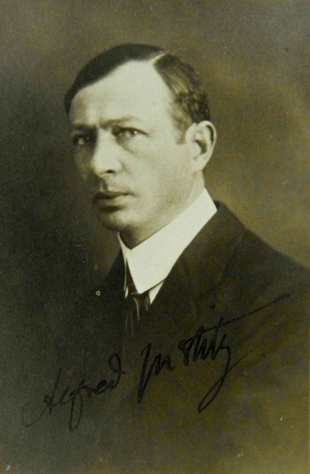 Czech painter Alfréd Justitz (1879-1934)